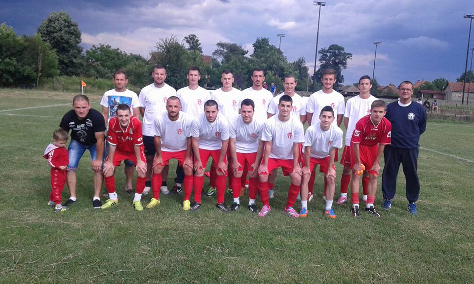 ФК Ударник Лозовик